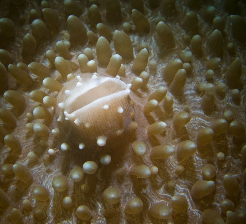 Boca de Amplexidiscus fenestrafer, en Koh Phangan, Tailandia